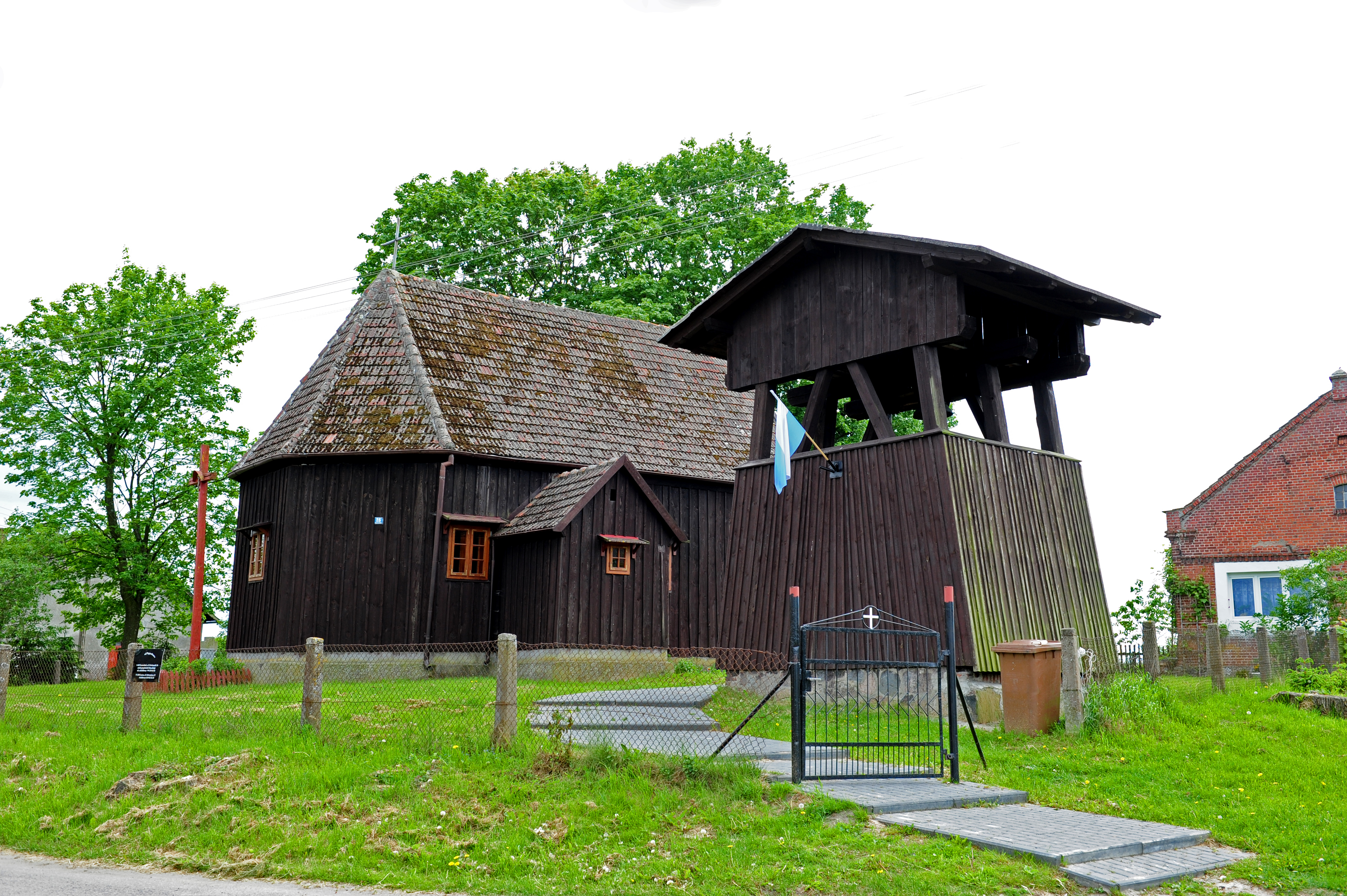 Nadziejewo - rzymskokatolicki kościół filialny p.w. św. Andrzeja Apostoła, 1753